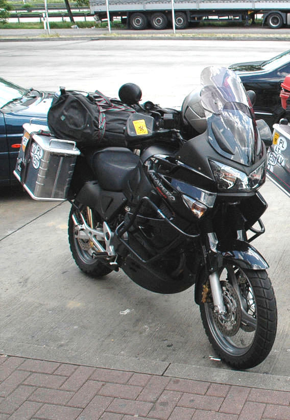 Honda Varadero XL 1000 V Bj.2005